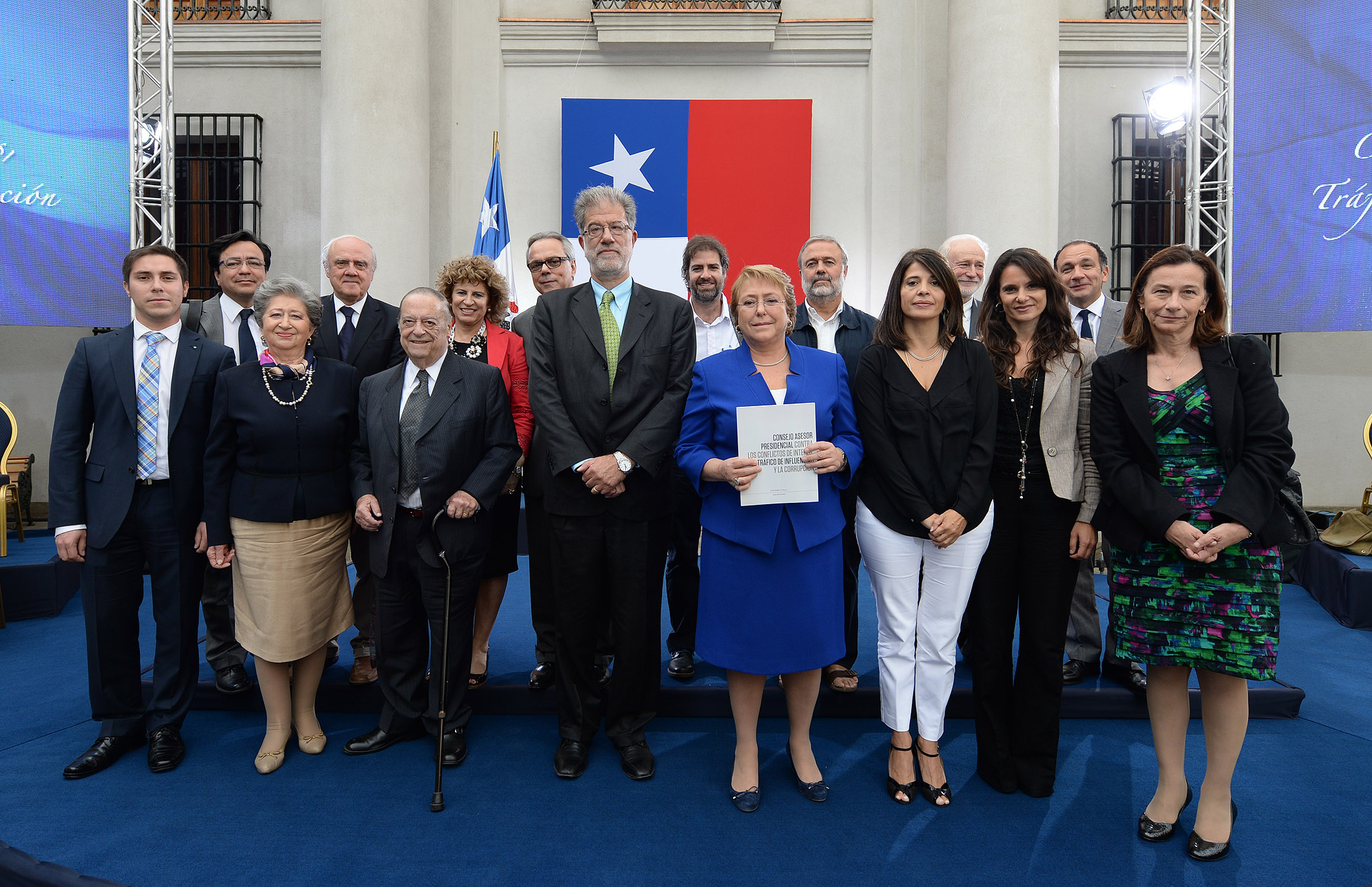 Gobierno de Chile